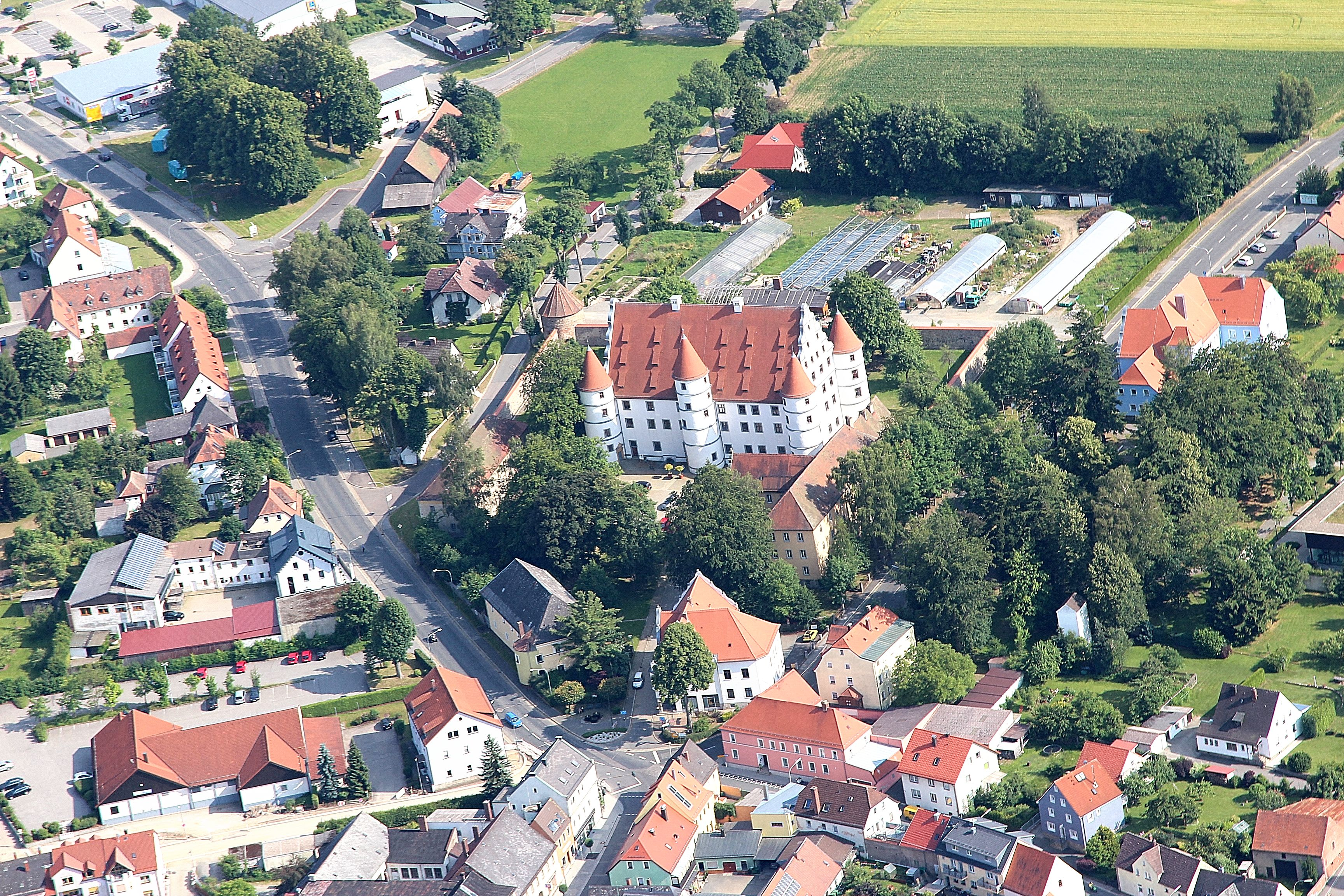 Vohenstrauß, Schloss Friedrichsburg (2013)